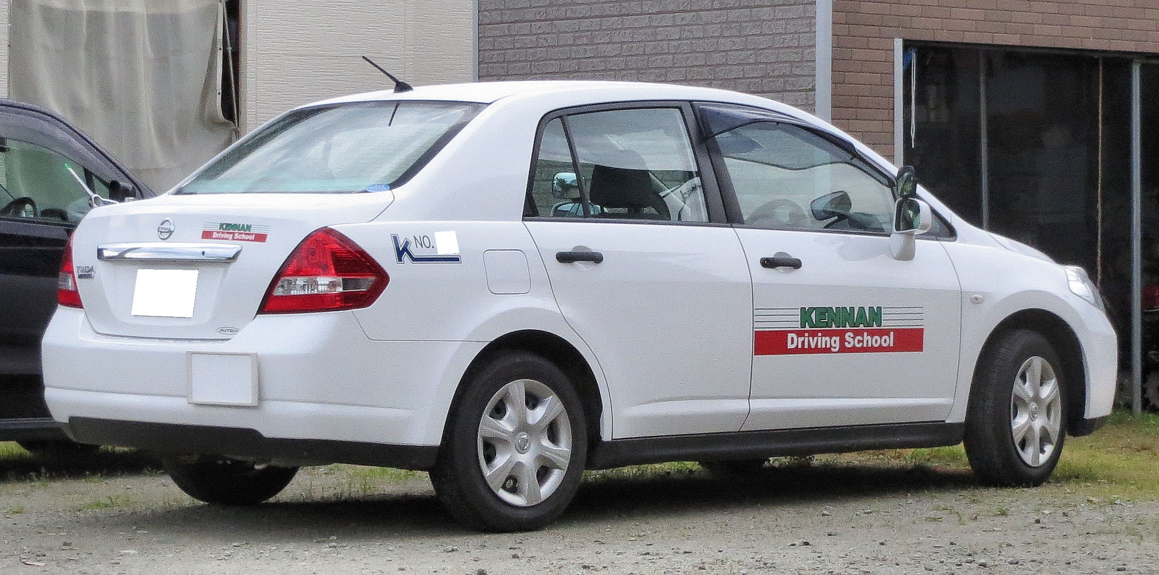 日産ティーダラティオ 後期型 県南自動車教習車（山形県)